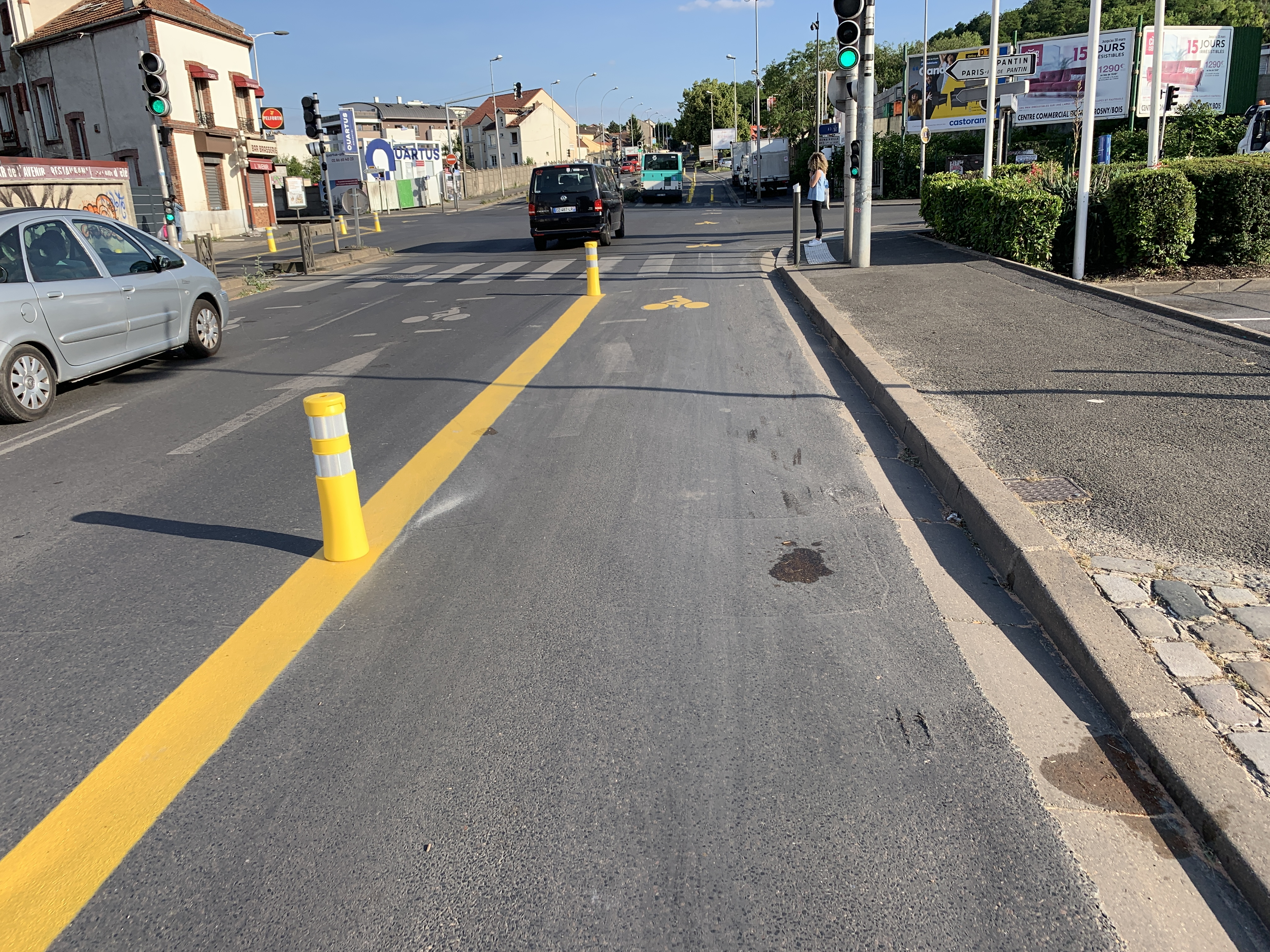 Voie cyclable le long de la rue du Parc, Noisy-le-Sec.